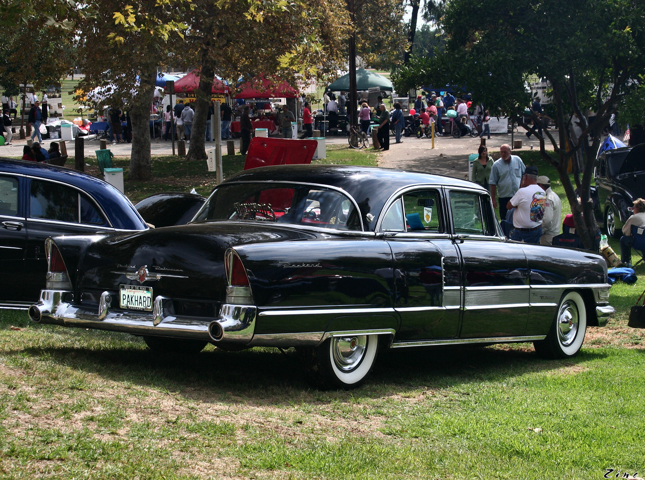 1955 Packard Patrician - 4d sdn - black - rvr